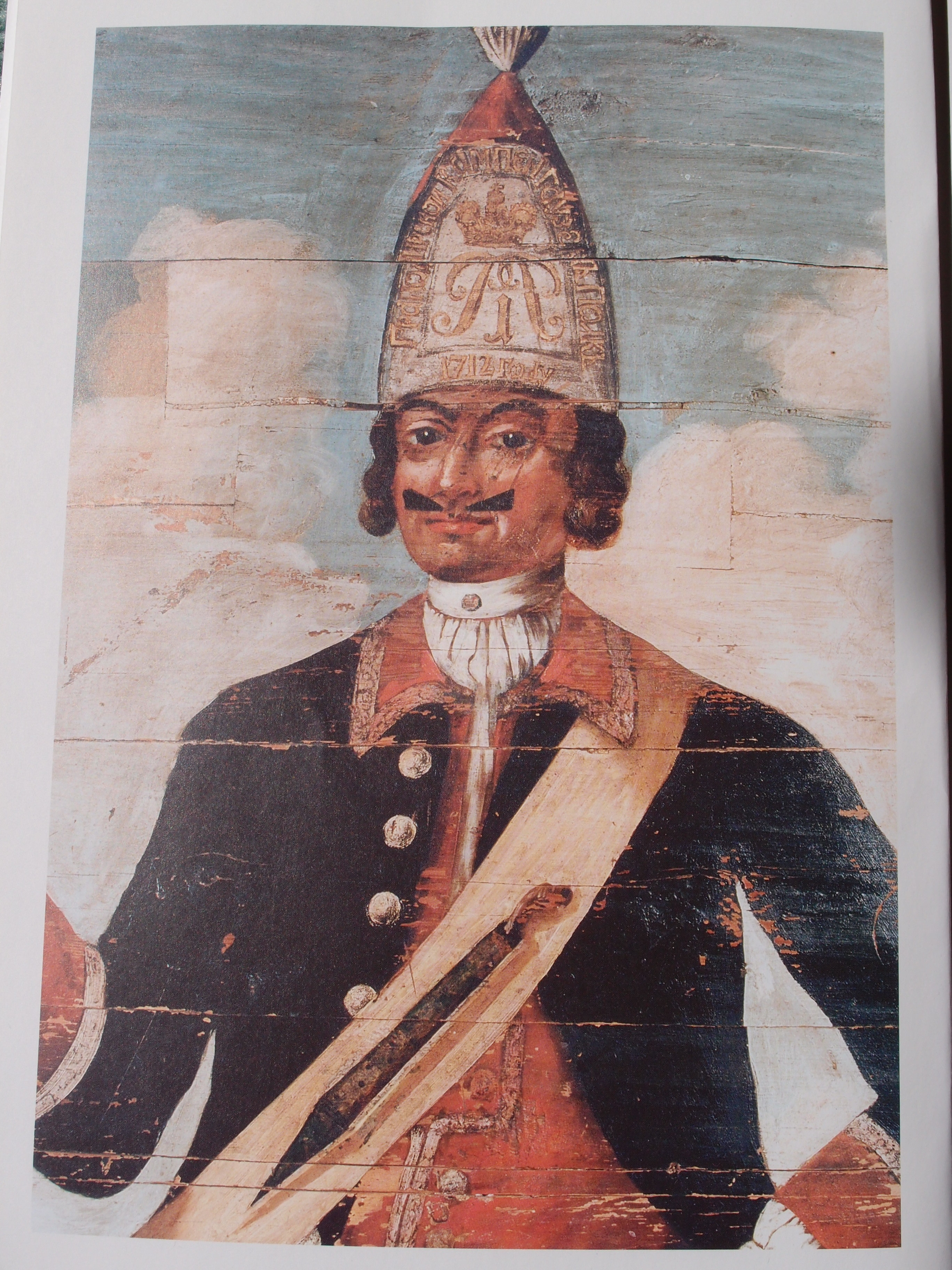 Gutshaus Orellen in Livland, Wandmalerei - russ. Grenadier (Ort heute: Ungurmuiža, Bezirk Pārgauja, Lettland) Datum: 18 Jahrhundert Urheber: unbekannt Quelle: "Gutshof unter den Eichen", Katalog der Ausstellung im Schlossmuseum Rundale und im Herder-Institut Marburg, 1998